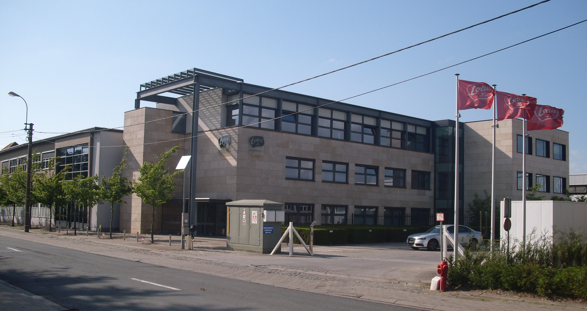 Lotus Bakeries - Gentstraat - Lembeke - Kaprijke - Oost-Vlaanderen - België